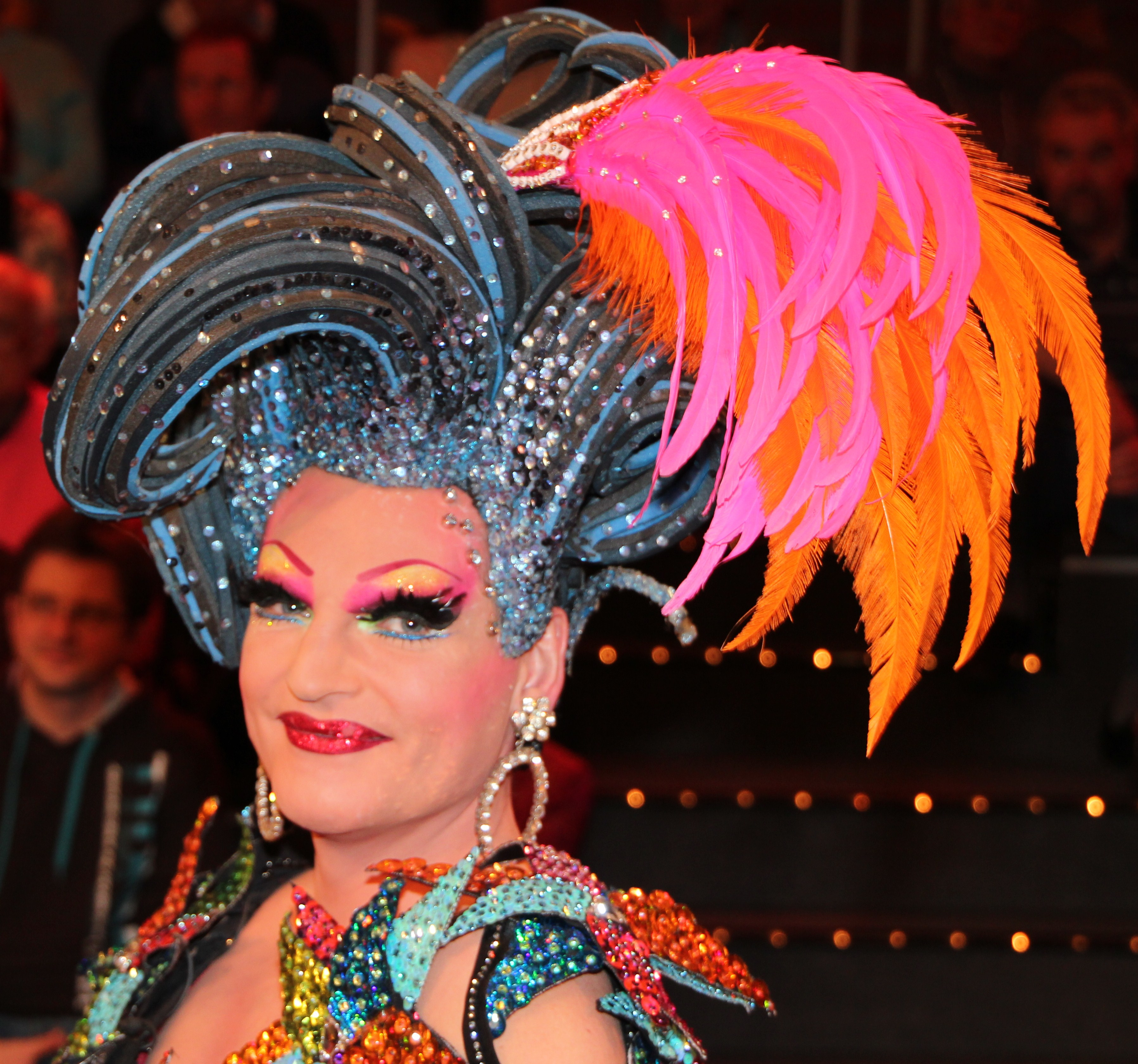 Olivia Jones (* 21. November 1969 in Springe) ist das Pseudonym des deutschen Travestiekünstlers Oliver Knöbel, der als Drag Queen bekannt wurde.